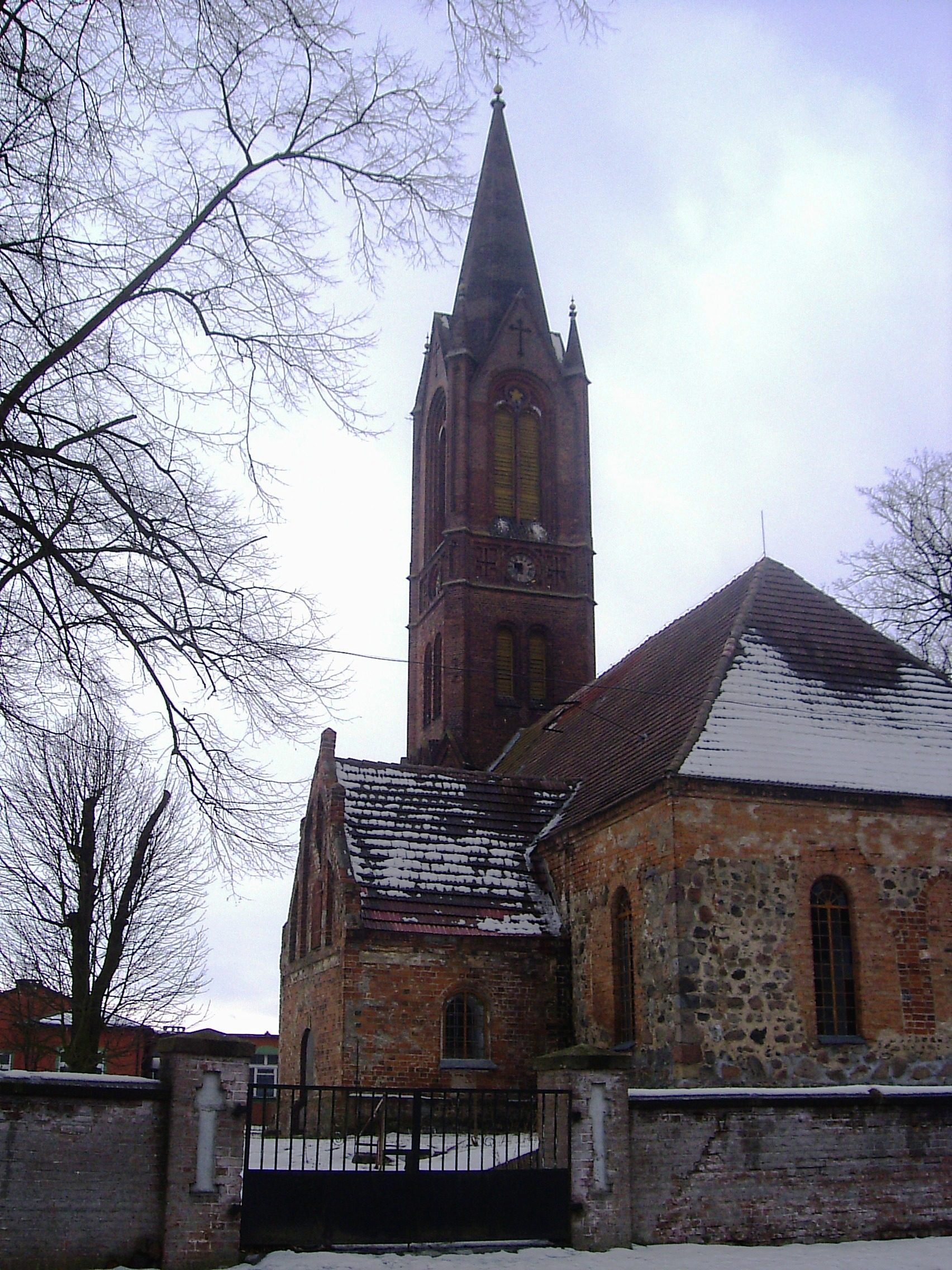 Kamień Wielki - kościół parafialny pw. św. Antoniego z XIV/XV, XIX w. (zabytek nr 636/63 i 88)